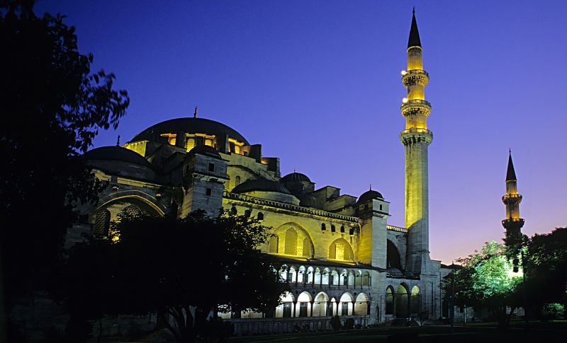 Suleimanie-Moschee in der Abenddämmerung Photograph: Florian Schott